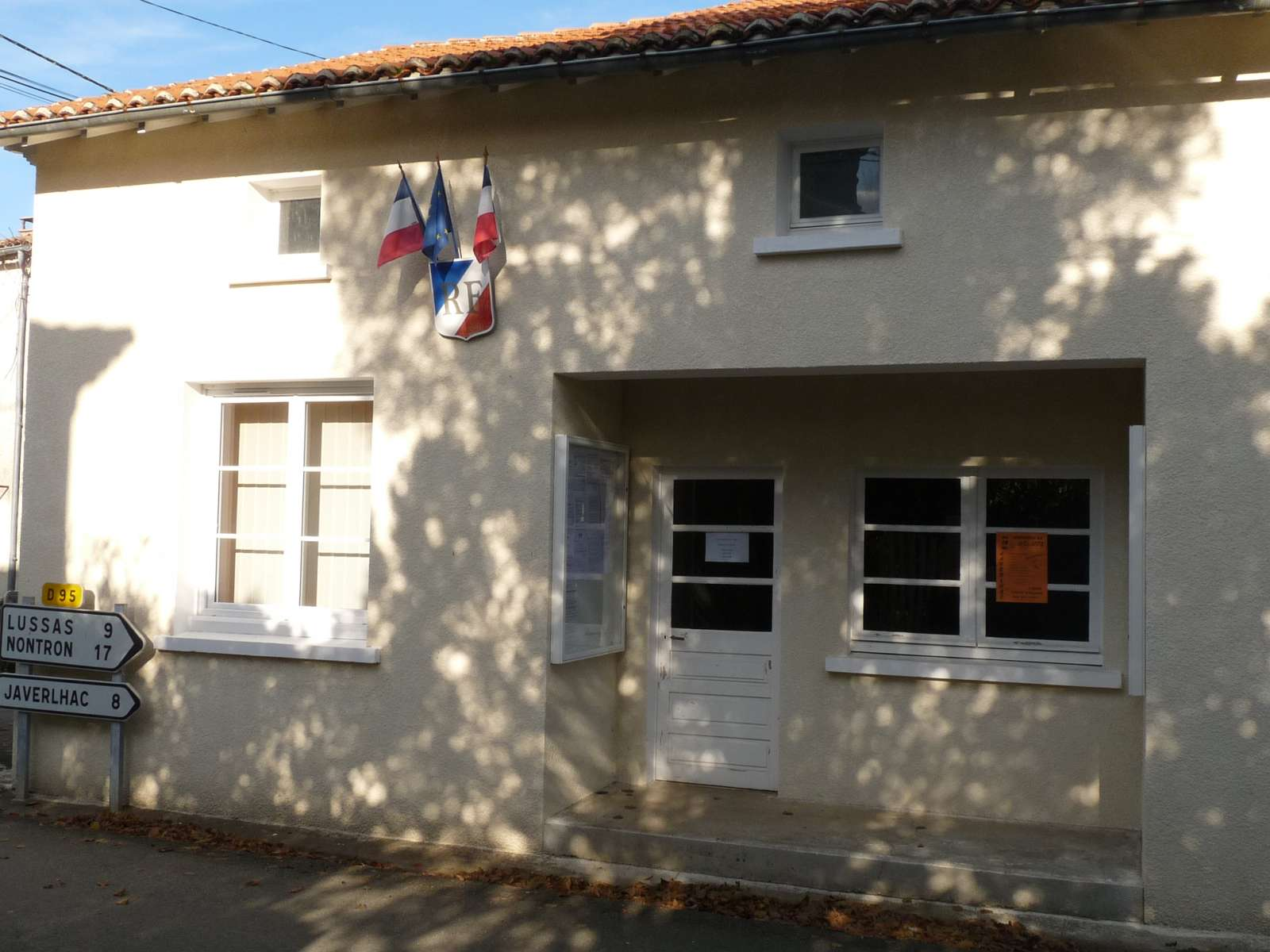 mairie de Hautefaye, Dordogne, France